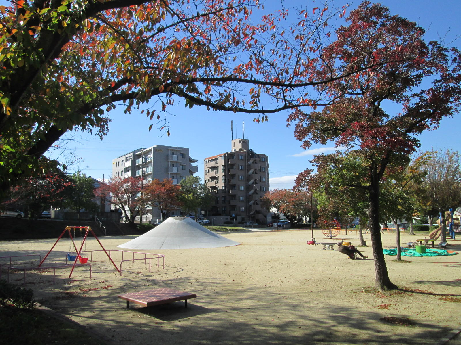 北東側より撮影